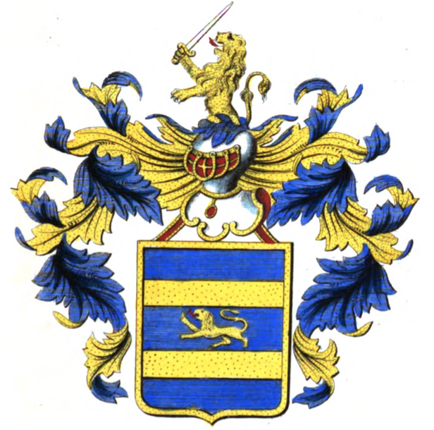 Armoiries de la famille de BehaultBlasonnement: d'azur à deux fasces d'or, accompagnées en abîme d'un lion léopardé du même, armé et lampassé de gueules, tenant de la patte dextre une épée d'or, à la bordure d'or.